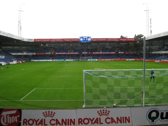 AutoC Park Randers